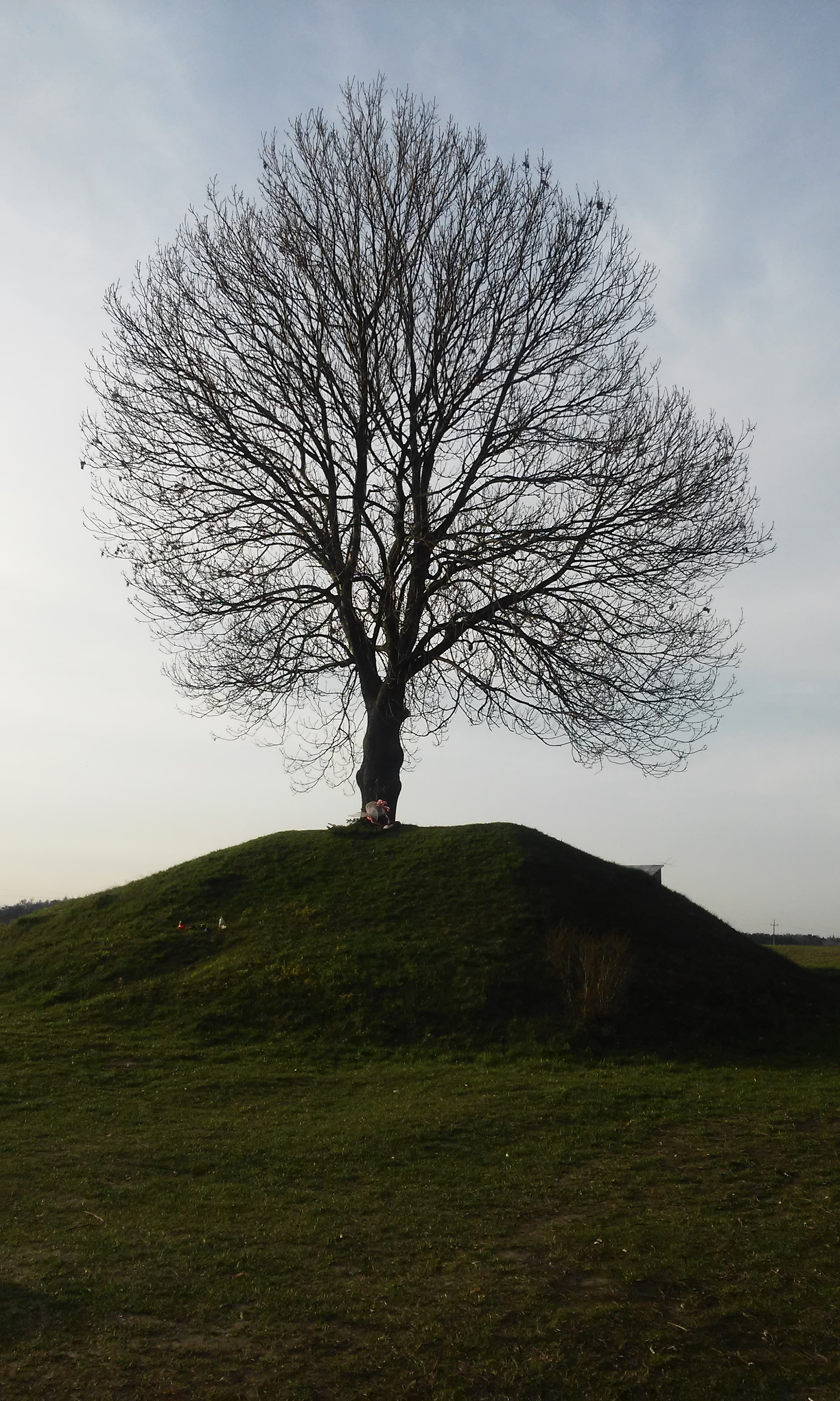 Cmentarz z I wojny światowej (kopiec) w Ubrodowicach